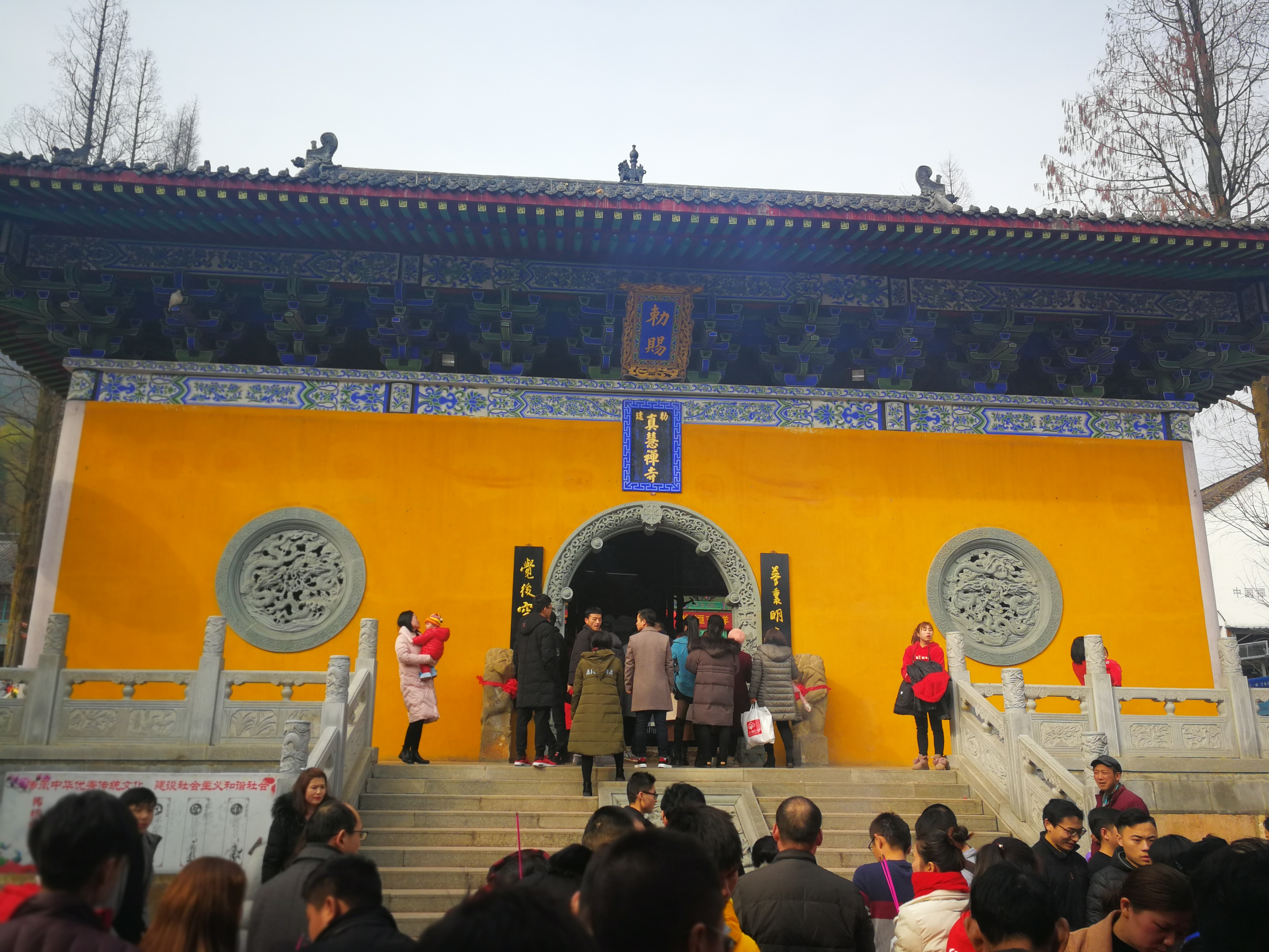 中文（中国大陆）: 五祖寺一角